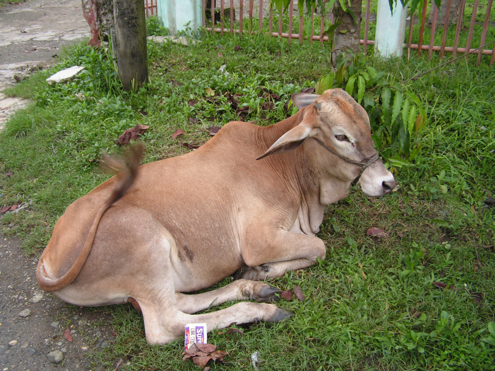 Philippine cow